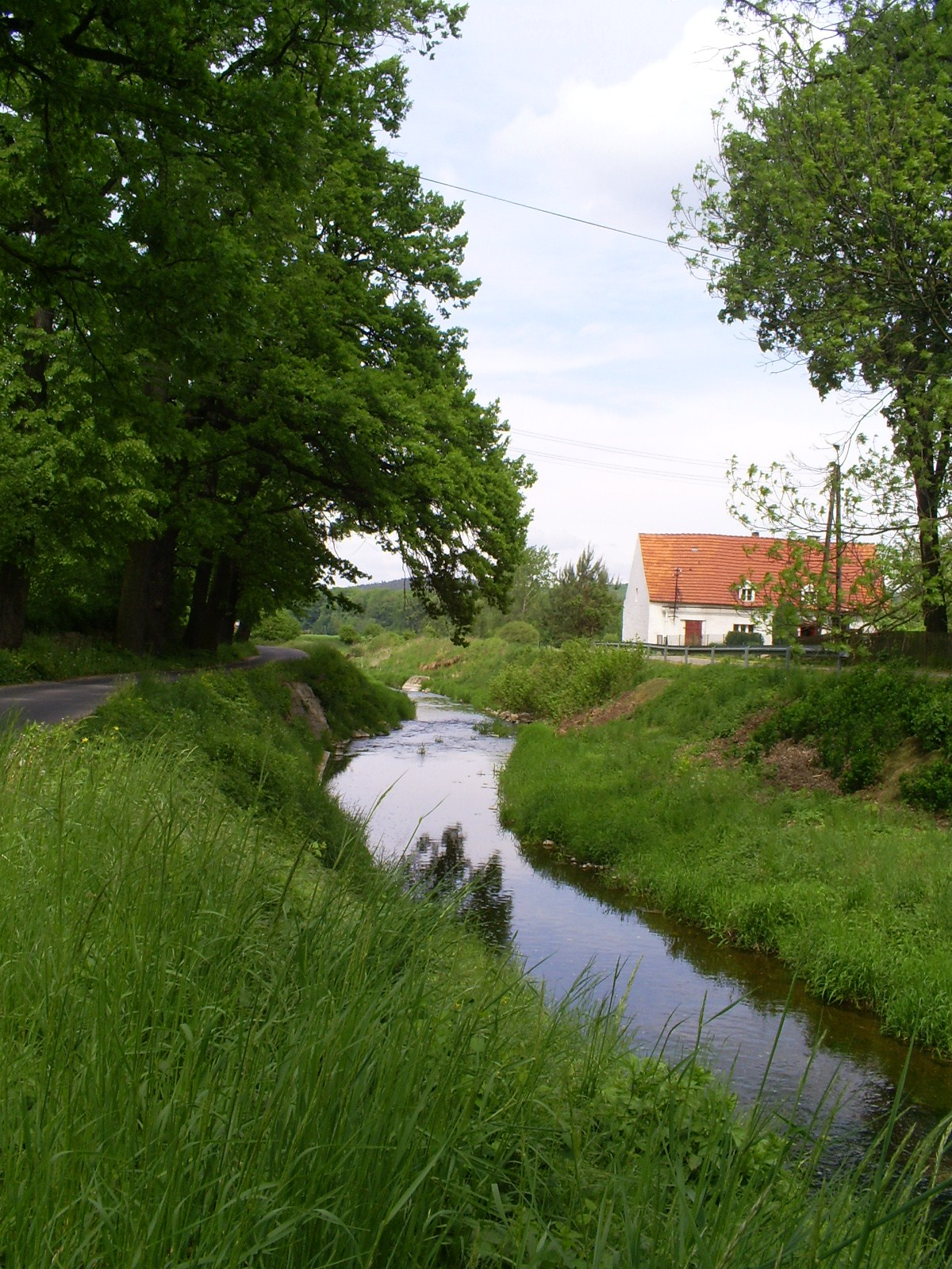 widok Nysy i wzgórz Strzegomskich latem